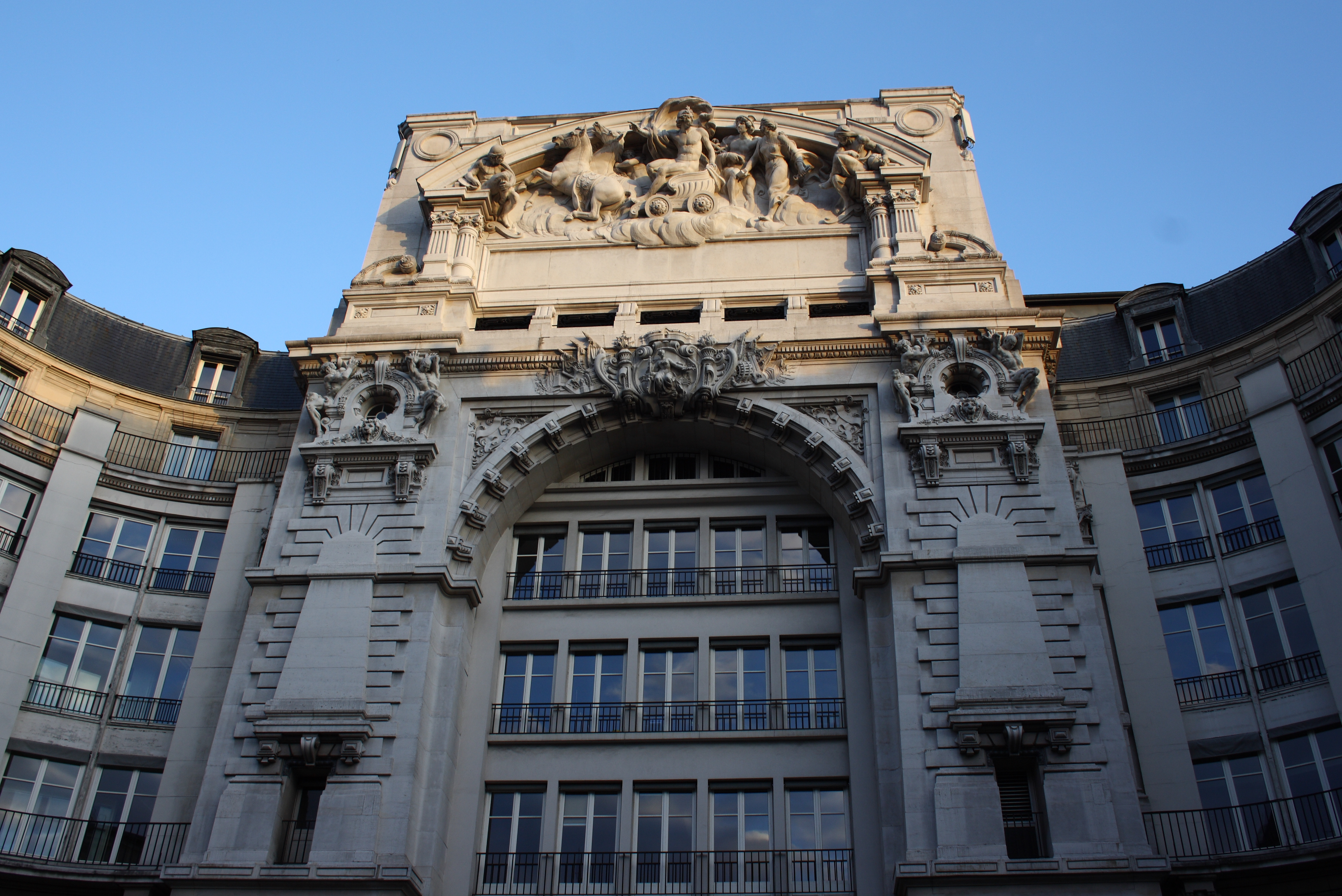 Ehemaliger Eingang zum Kaufhaus Grands Magasins Dufayel, 26, rue de Clignancourt im 18. Arrondissement von Paris, Relief von Jules Dalou Le Progrès entraînant le commerce et l'industrie